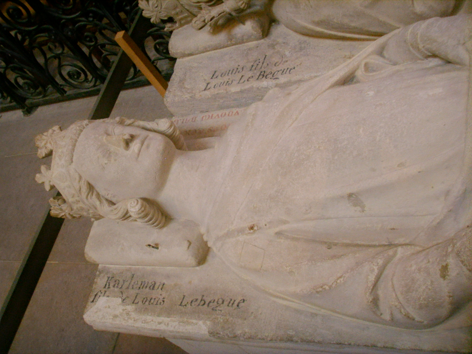 Basilica_di_saint_Denis Carlomanno_II_di_Francia Paris